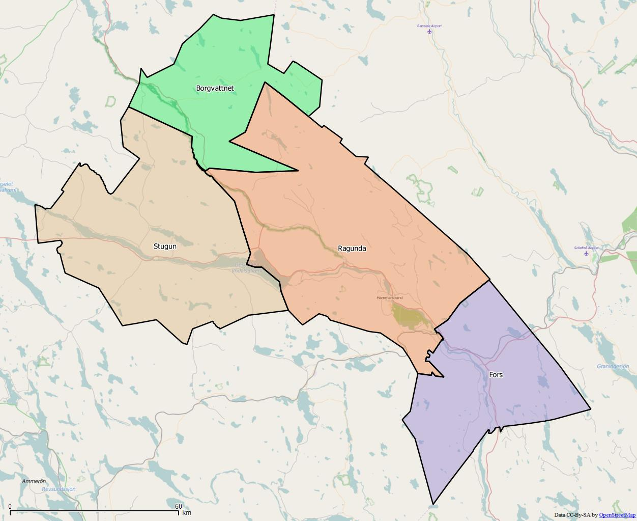 Distriktsindelningen i Ragunda kommun World file: 181.08413304511969955 0 0 -181.08413304511969955 1682088.41975611727684736 9232665.67405379936099052